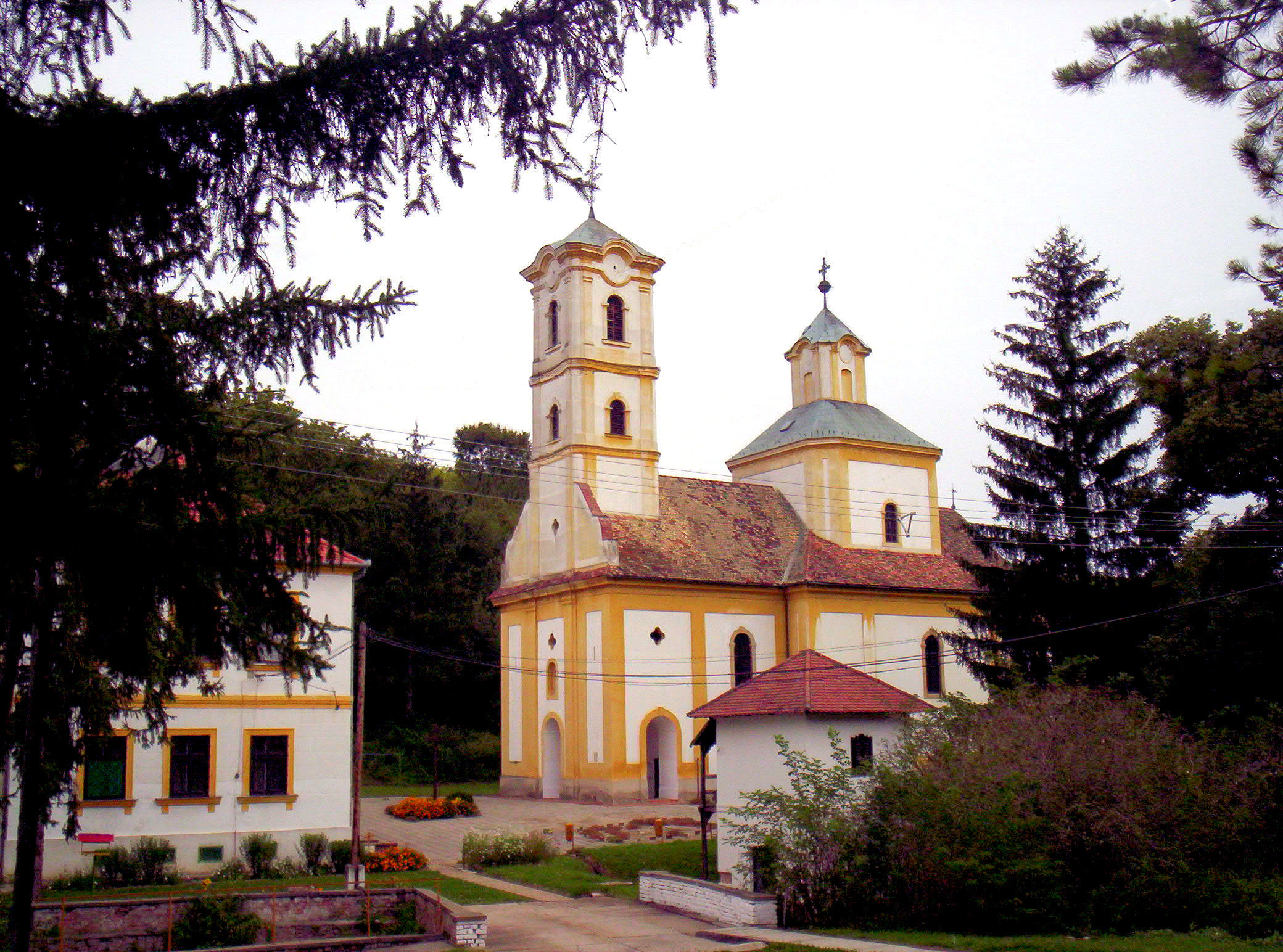 A grábóci szerb ortodox kolostor és templom. Az egyetlen fennmaradt kupolás szerb templom Magyarországon – photo taken by uploader User:Csanády in 2006.